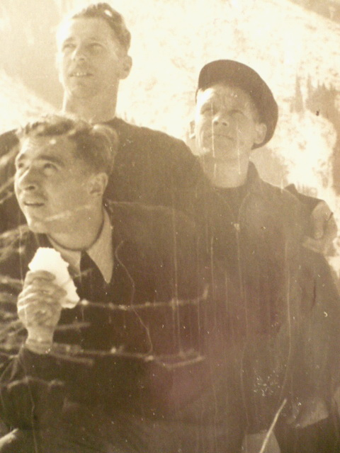 Советские конькобежцы Е.Гришин, К.Кудрявцев, Г.Пискунов, урочище Заилийского Алатау Медео, 1951